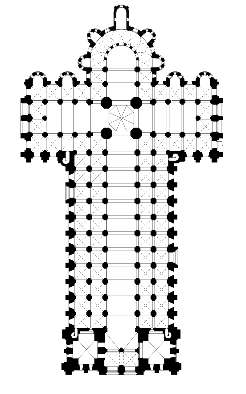 Plan des structures architecturales de la basilique Saint-Sernin de Toulouse